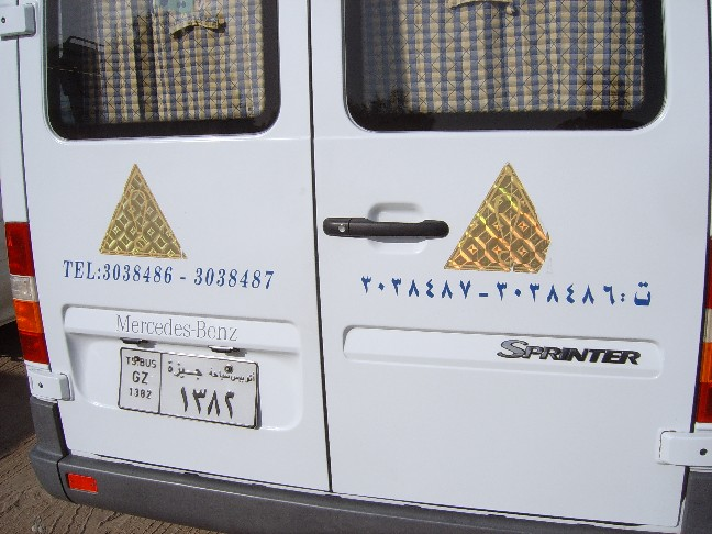 Numéro de téléphone "bilingue" avec chiffres arabo-indiens. Louxor, égypte, mai 2006. Personnal picture, I set it in public domain.